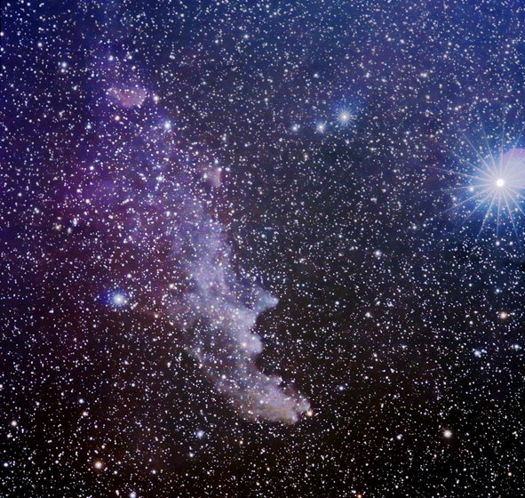 Velmi jemná mlhovina, o které se věří, že je zbytkem supernovy nebo plynového mraku, osvíceného blízkou superobří hvězdou Rigl v souhvězdí Orion